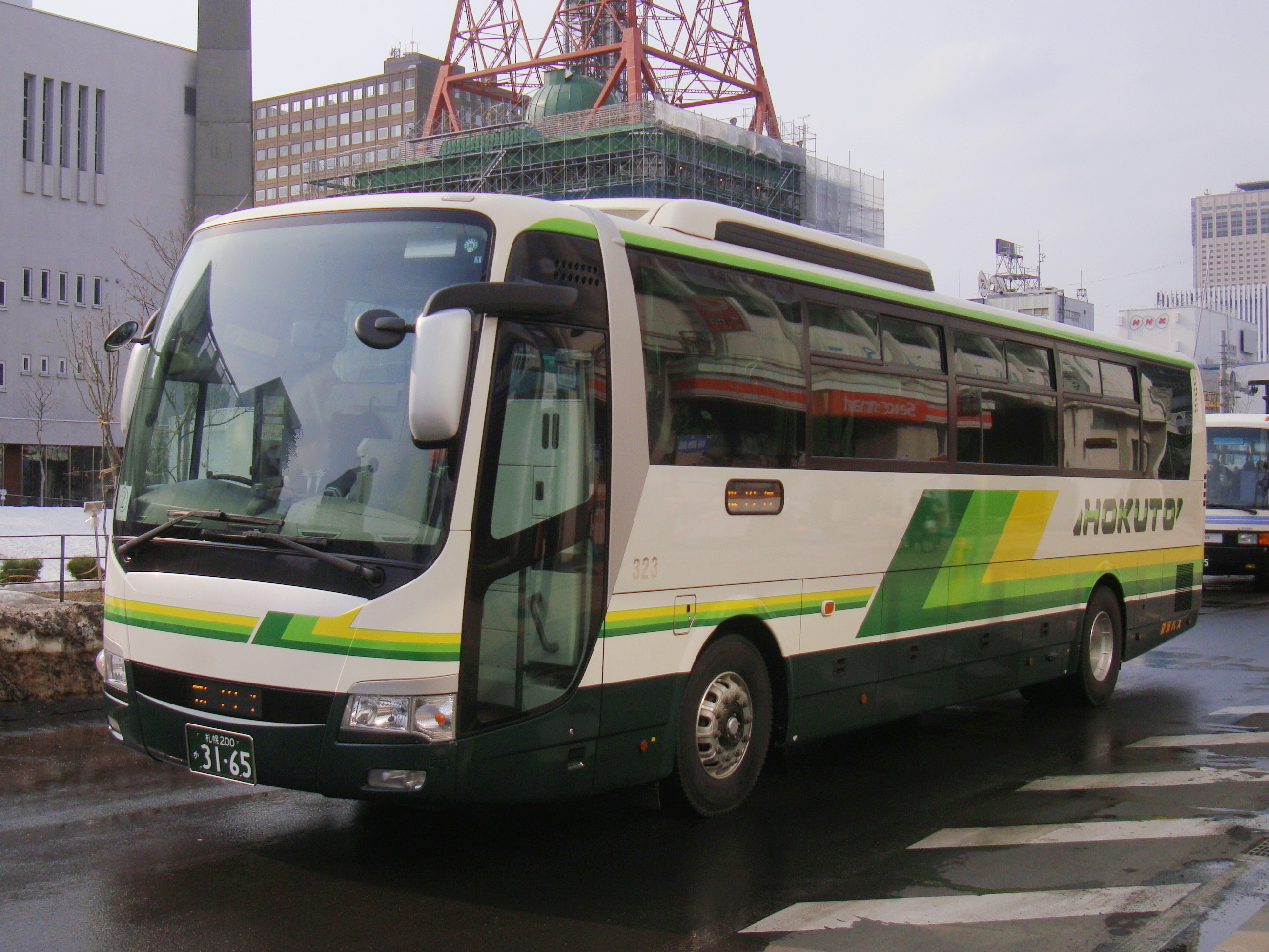 "Tokkyū Hamanasu gō" Sapporo to Wakkanai